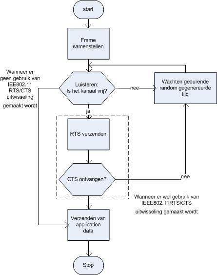 werking CSMA/CA algoritme